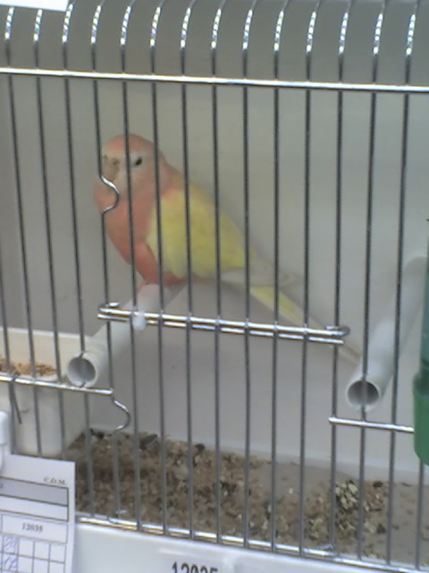 Parrocchetto di Bourke, mutazione lutina, Esposizione ornitologica internazionale di Reggio Emilia, 2008.